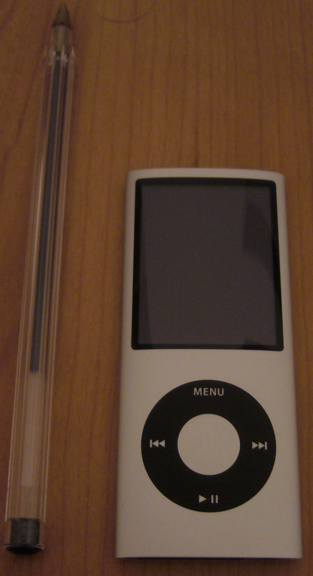 Photo d'un Apple Ipod Nano 4ème génération.